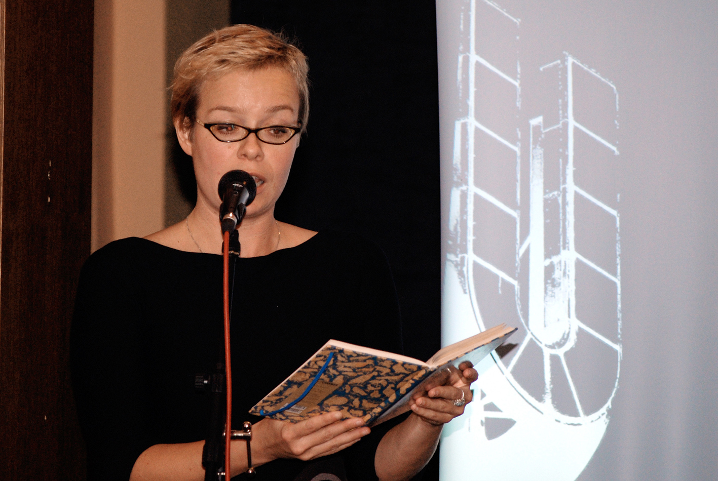 Lesung beim LesArt.Festival im Taranta Babu in Dortmund am 11. November 2010, Foto von Hartmut Salmen